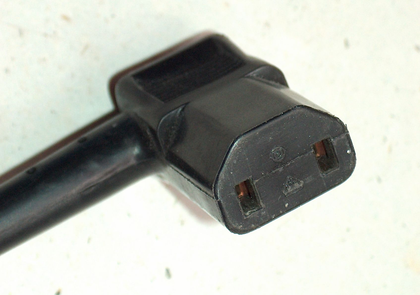 Kaltgerätekupplung (elektrisch, 230 Volt), 2polig, schwarz, angeschlossen an einen Staubsauger. Selbst fotografiert im April 2006. Photo taken by myself in April 2006. The plug (cord connector) is connected to a vacuum.